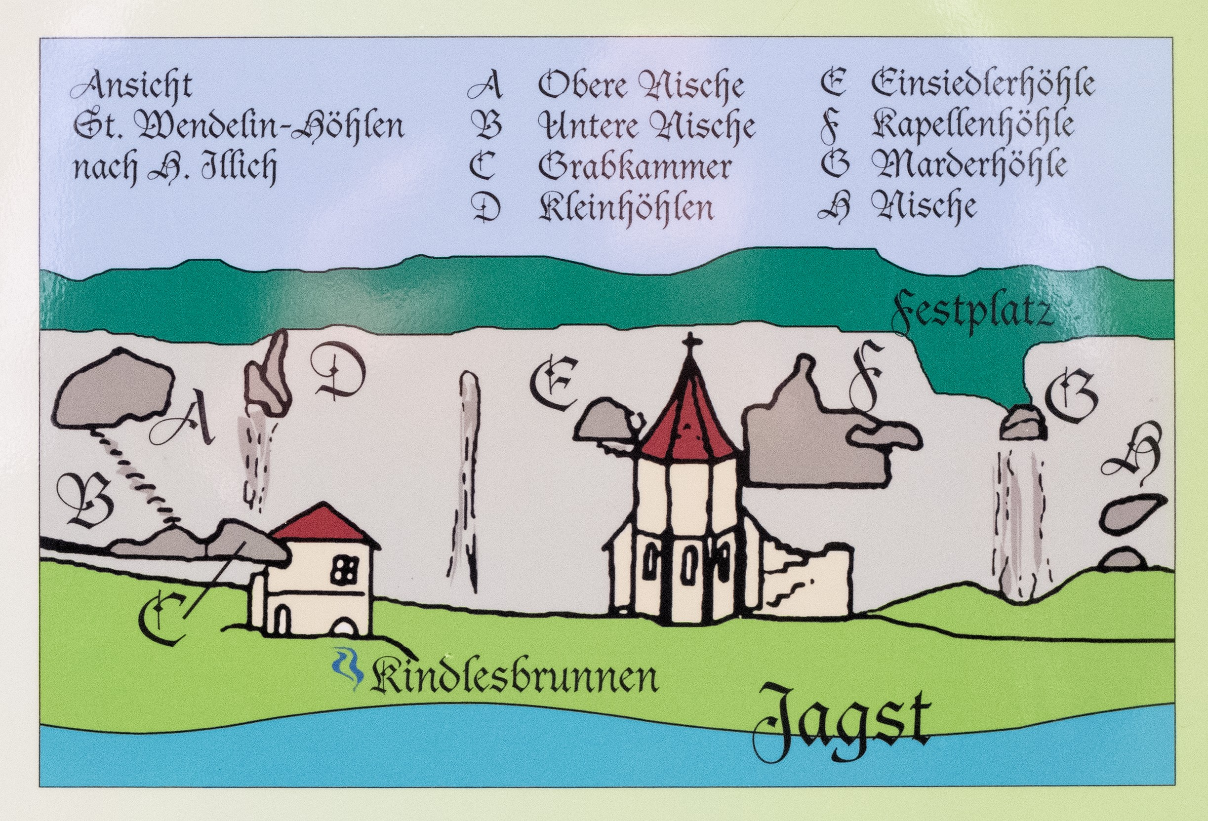 Detailaufnahme der Informationen zu den Höhlen vom Infoschild der Pfade der Stille bei St. Wendel zum Stein.